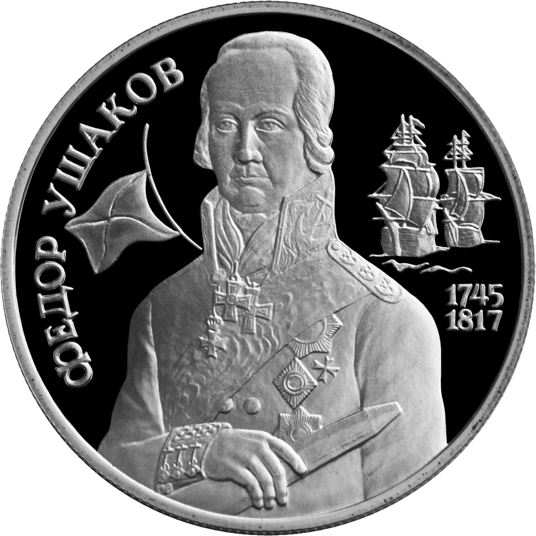 Монета Банка России — Серия: «Выдающиеся личности России», 250-летие со дня рождения Ф.Ф. Ушакова, 2 рубля, реверс.